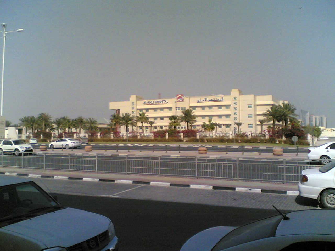 al ahli hospital